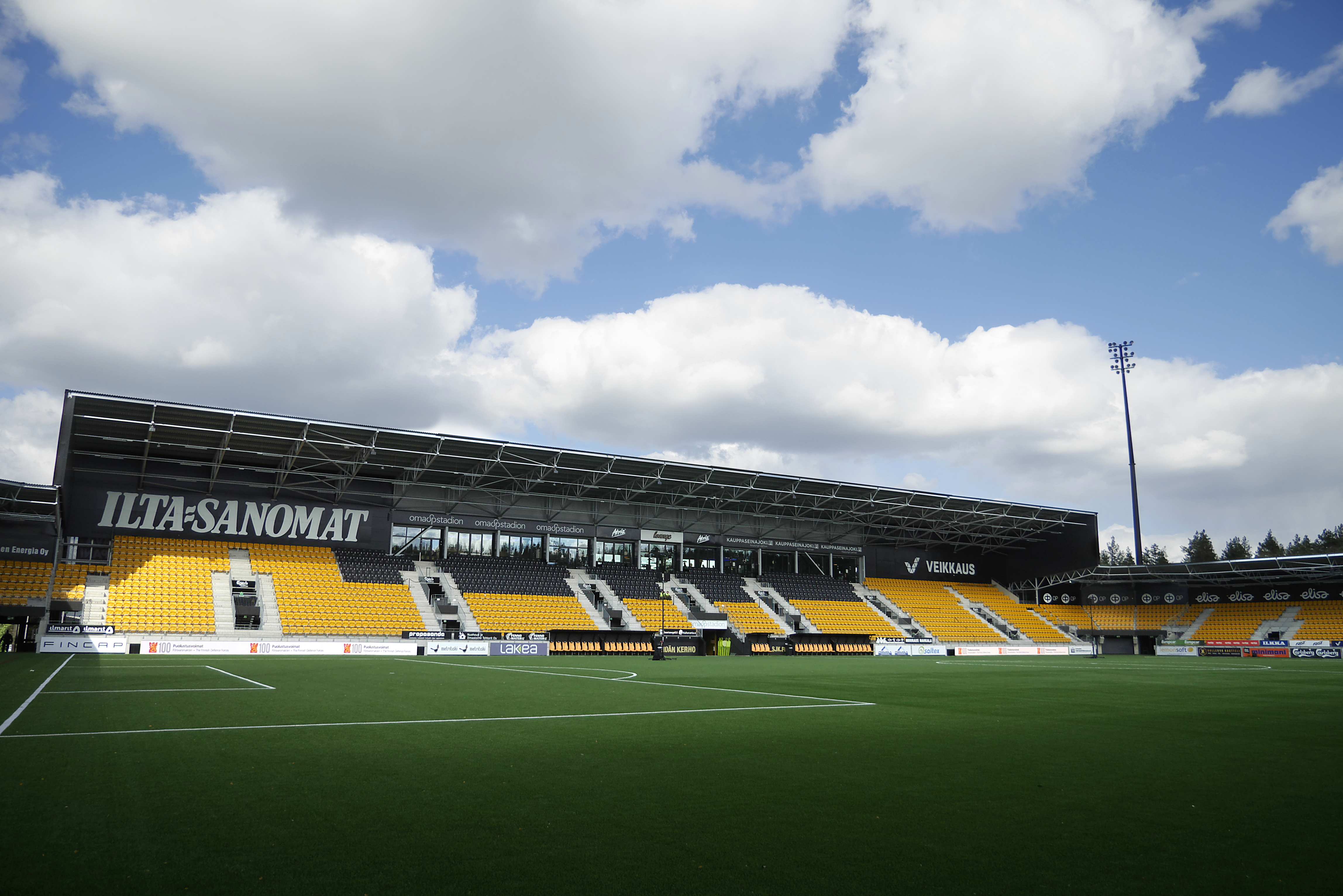 OmaSp stadionin pääkatsomo.